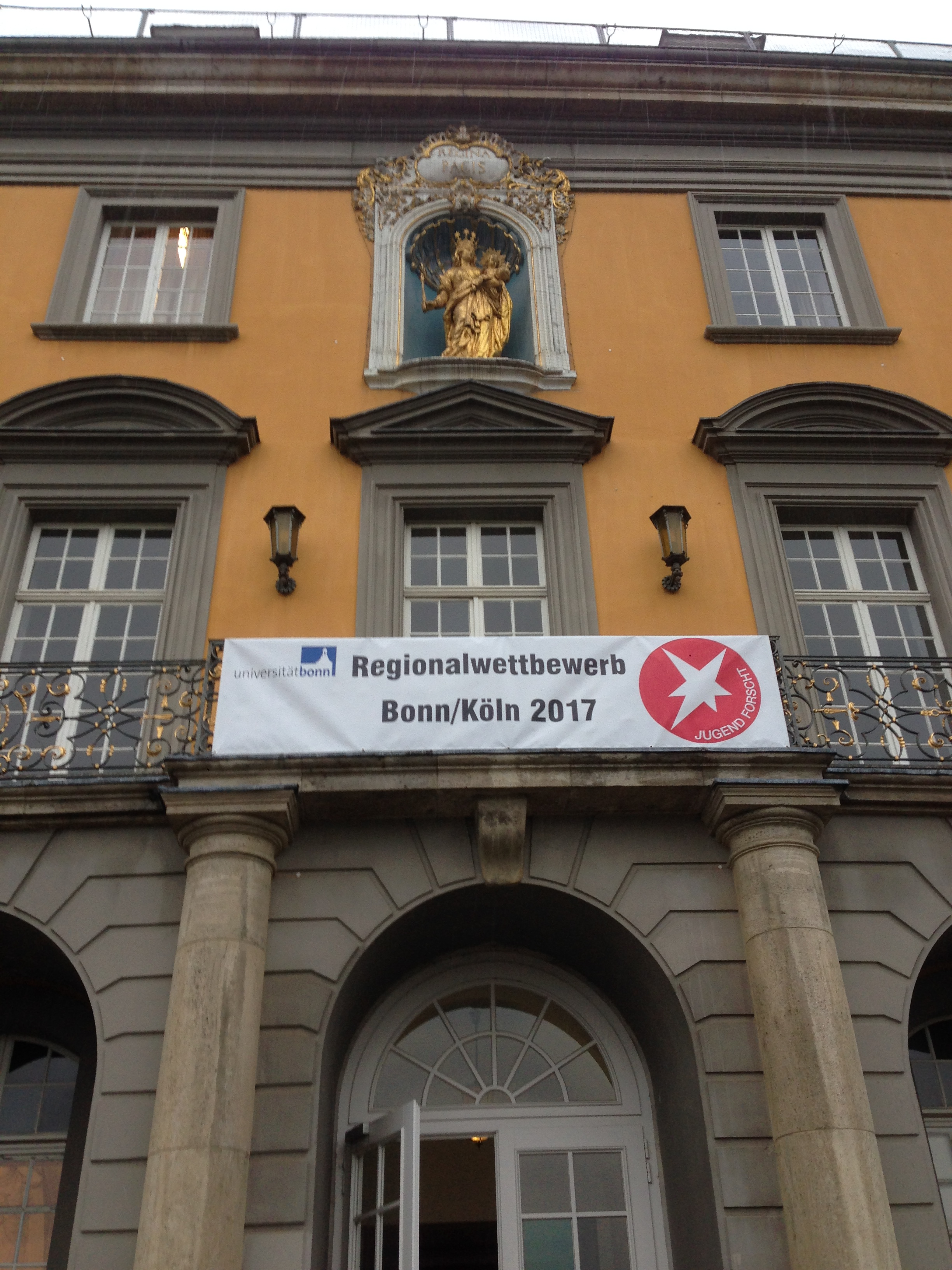 Transparent zum Regionalwettbewerb "Jugend forscht", 2017 Bonn, veranstaltet in der Universität Bonn